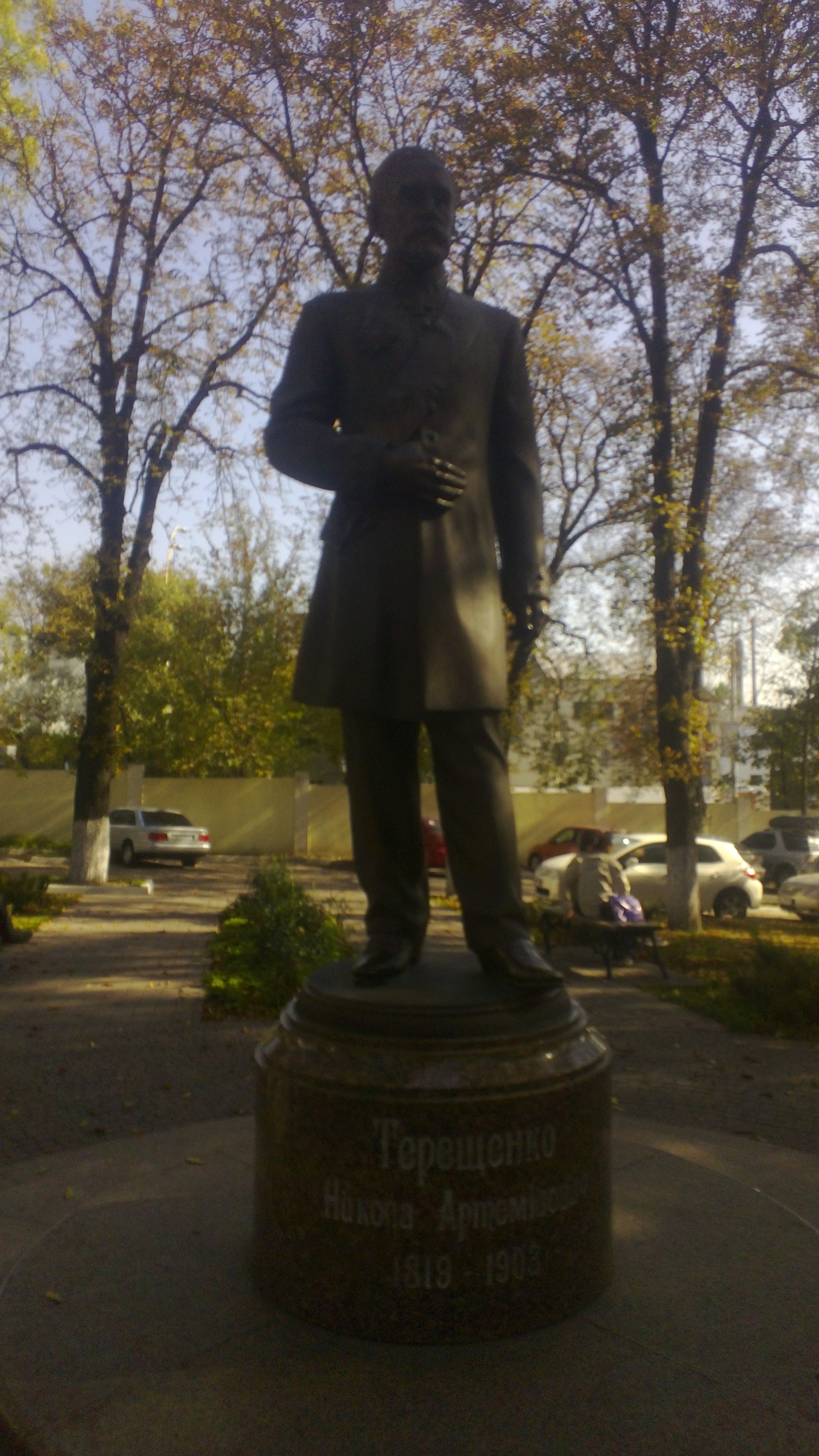 Київ. Пам'ятник Н. А. Терещенку на території лікарні "Охматдит" (скульптор Олександр Михайлицький, 2009).